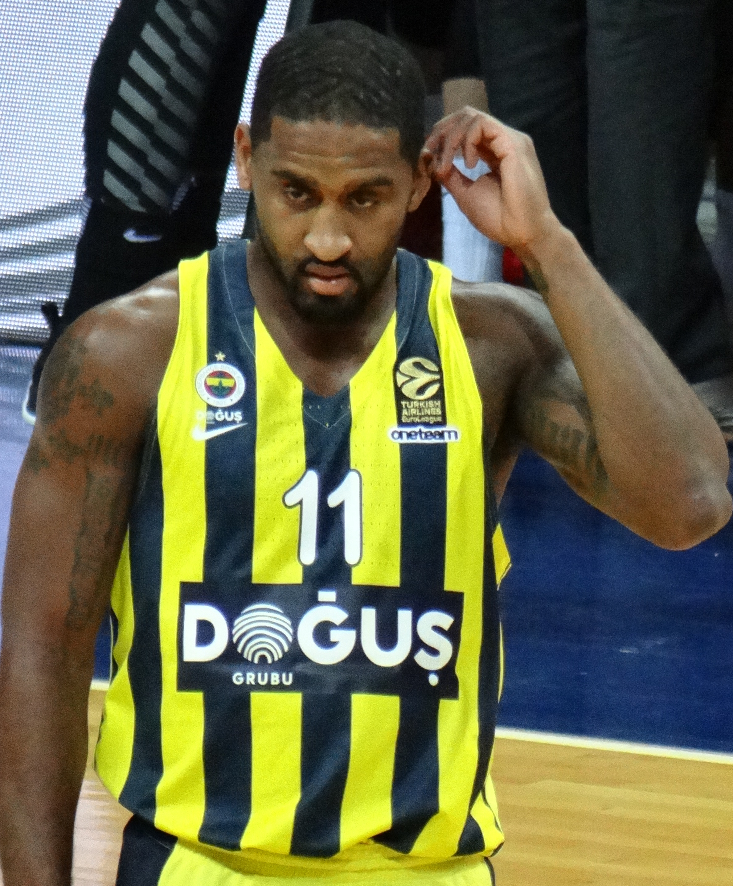 Brad Wanamaker 11 - FB Dogus 20171219